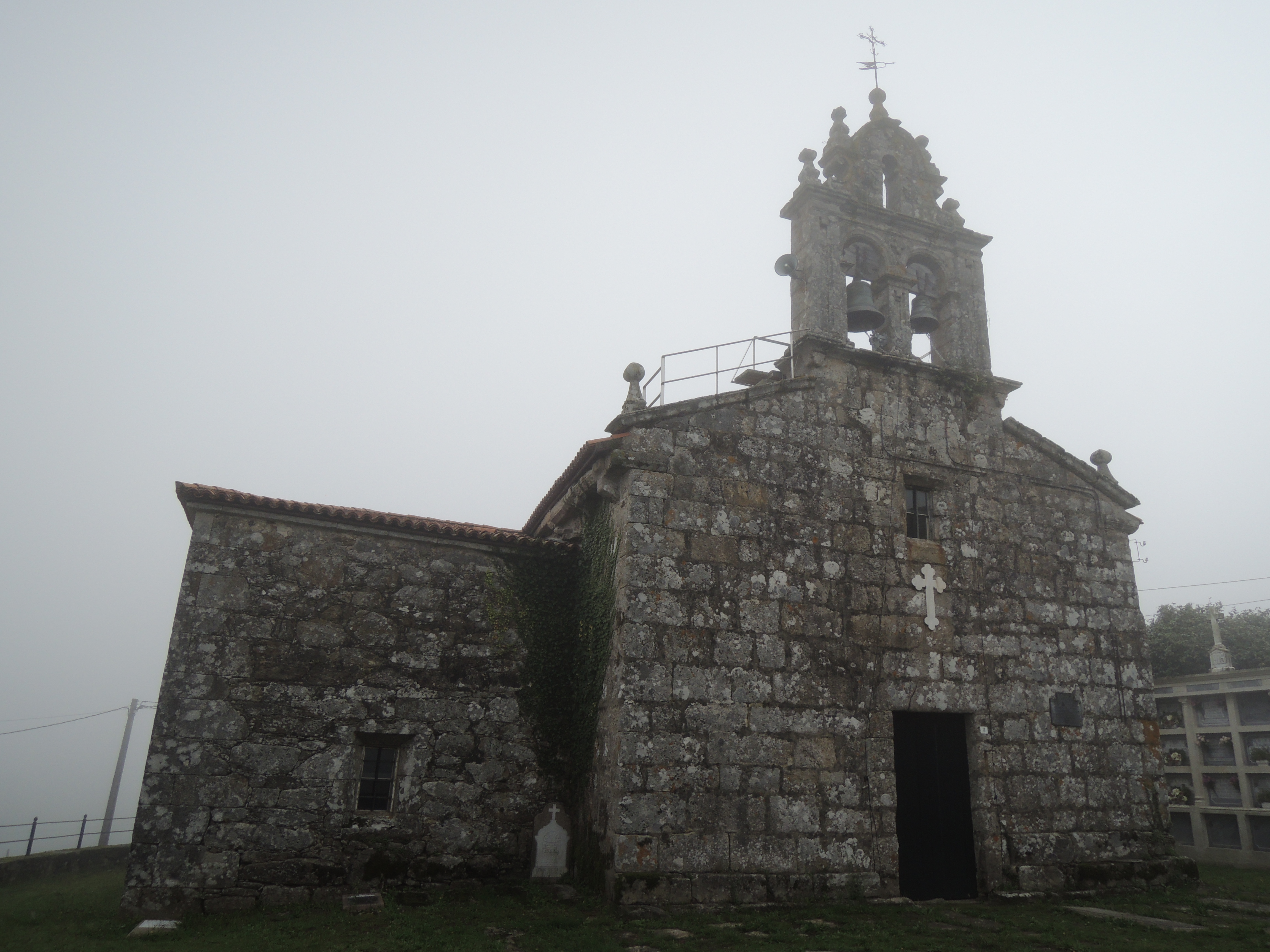 Iglesia de Santa Mariña de Agar